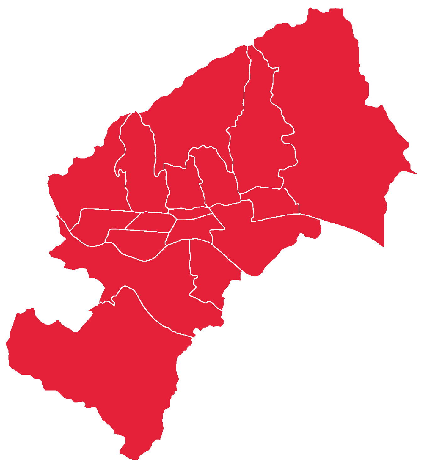 Izbori za vijeća gradskih četvrti u Zagrebu 2009